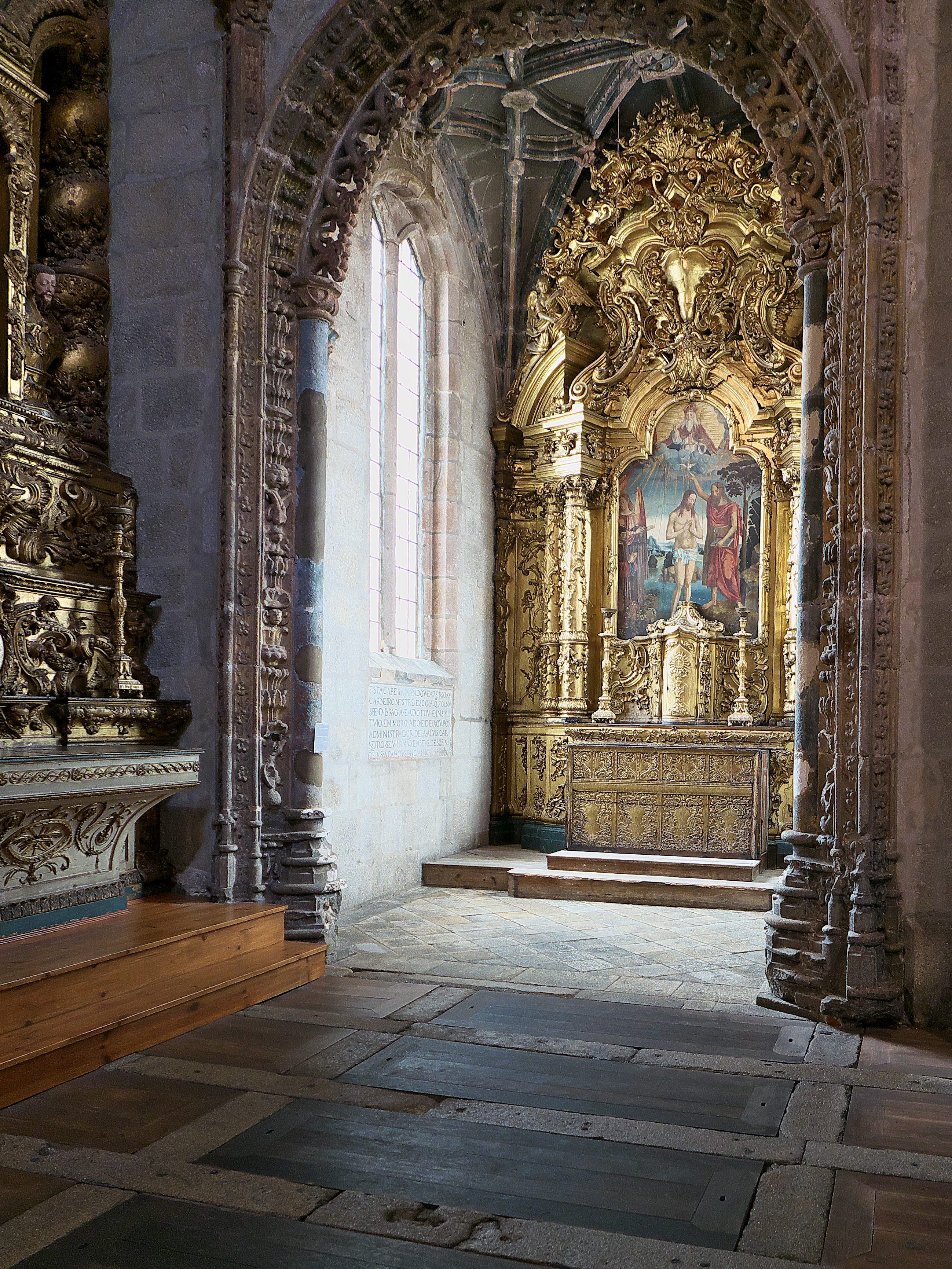 Capilla trazada por Diogo de Castilho (1530-1540)